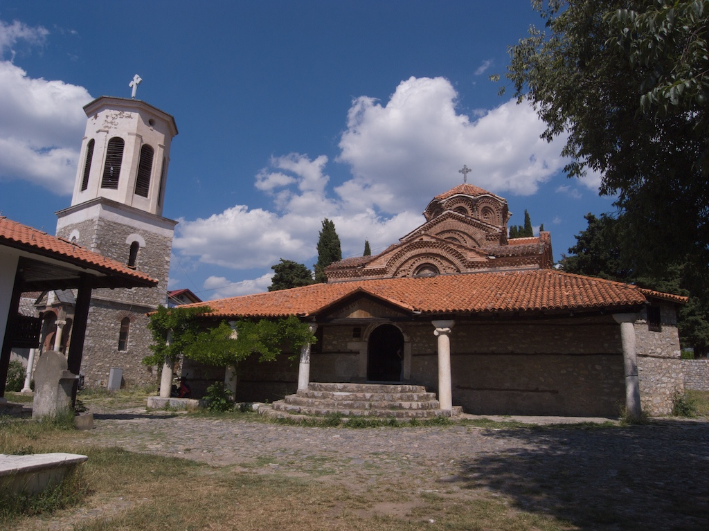 Света Богородица Перивлепта (Свети Климент), Охрид, Република Македония.